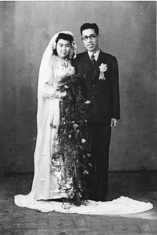 1947年，姚奠中结婚照